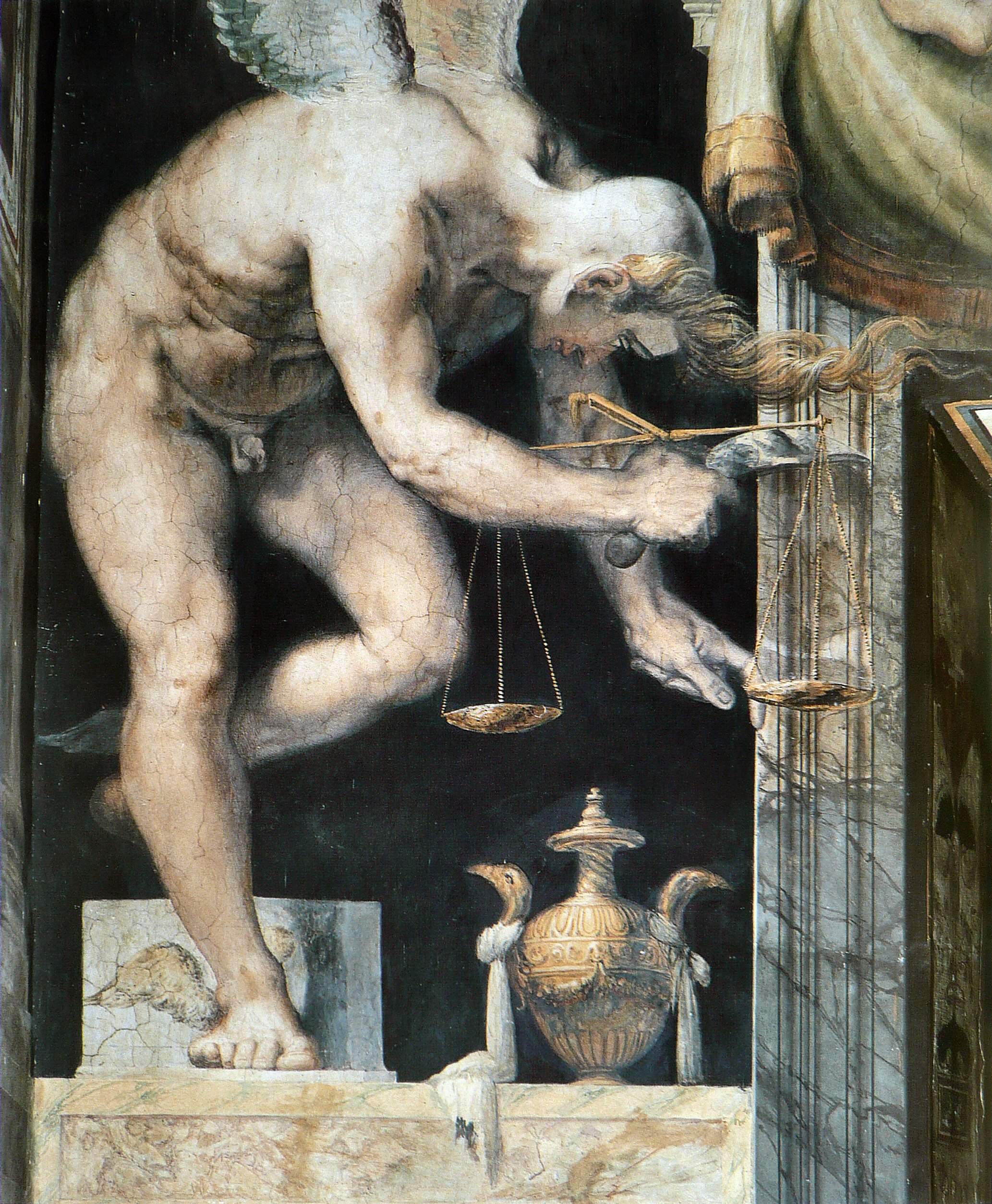 L'Ange de la Justicelabel QS:Lfr,"L'Ange de la Justice"